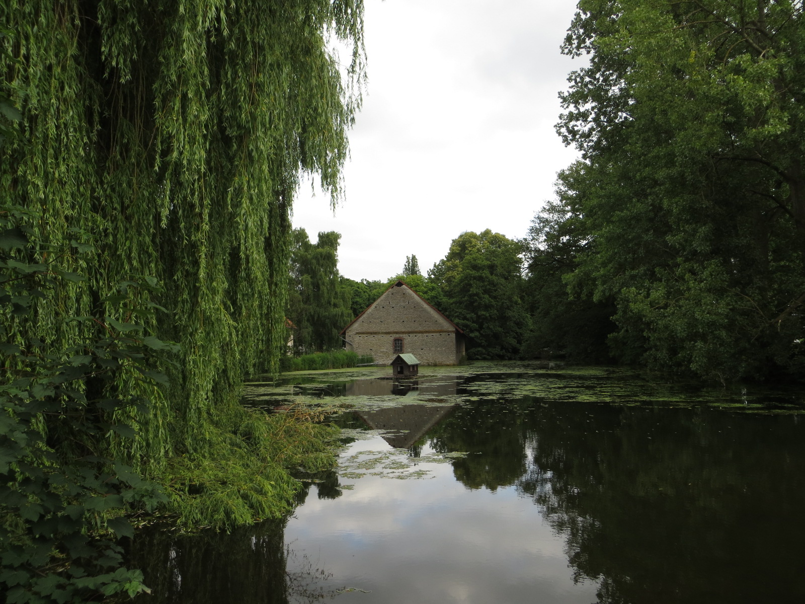 Der Stauteich der 1785 erbauten Wassermühle des Hofes der Meyer zu Bentrup.